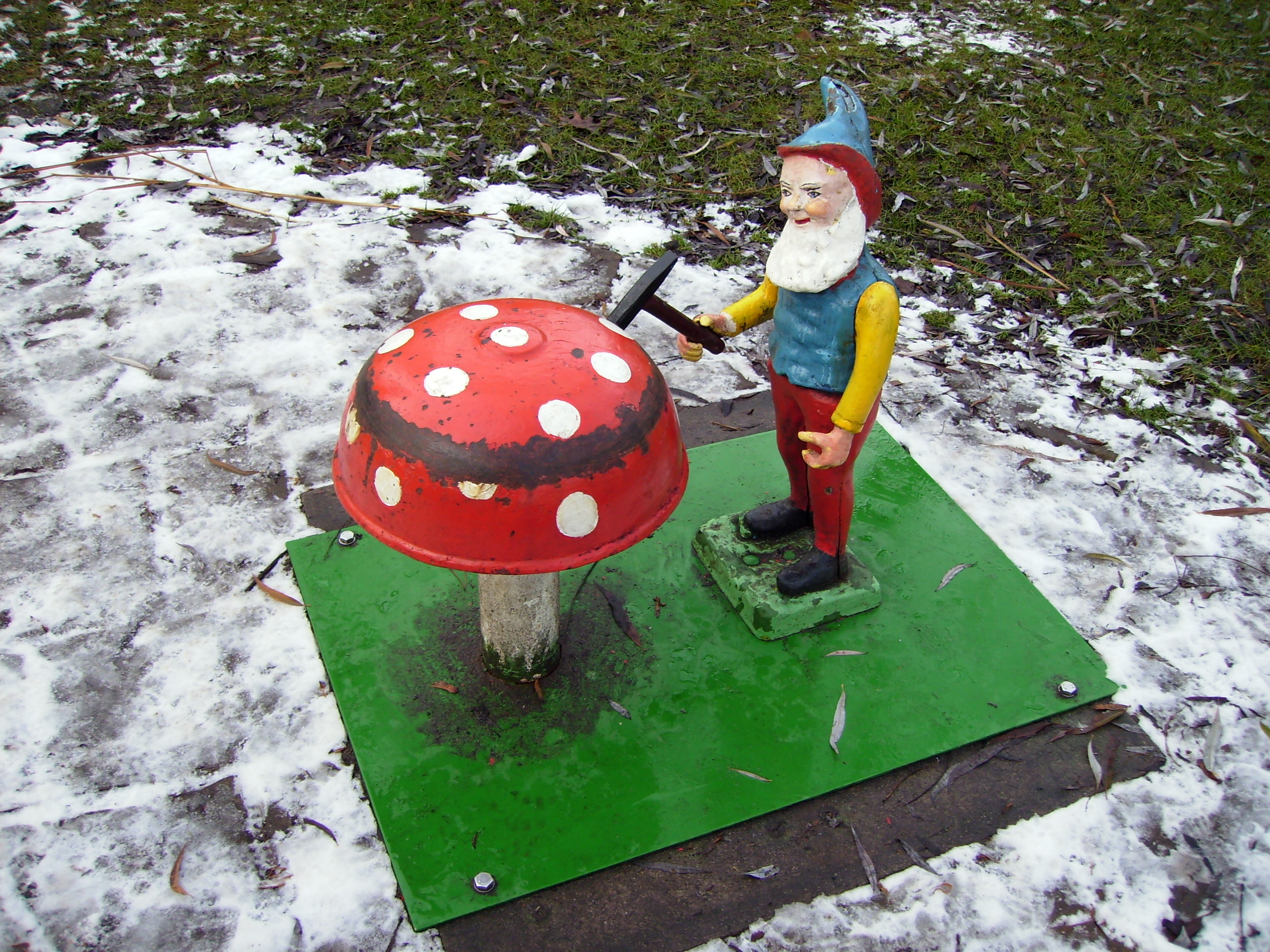 Legendární poděbradský trpaslík.